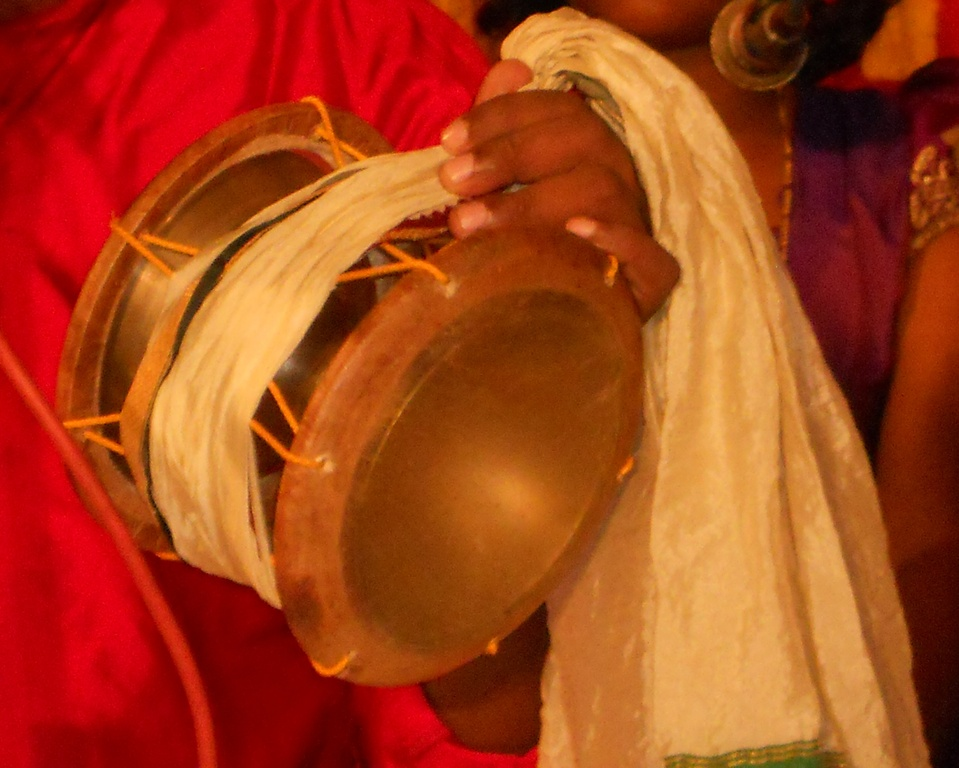 ഉടുക്ക്